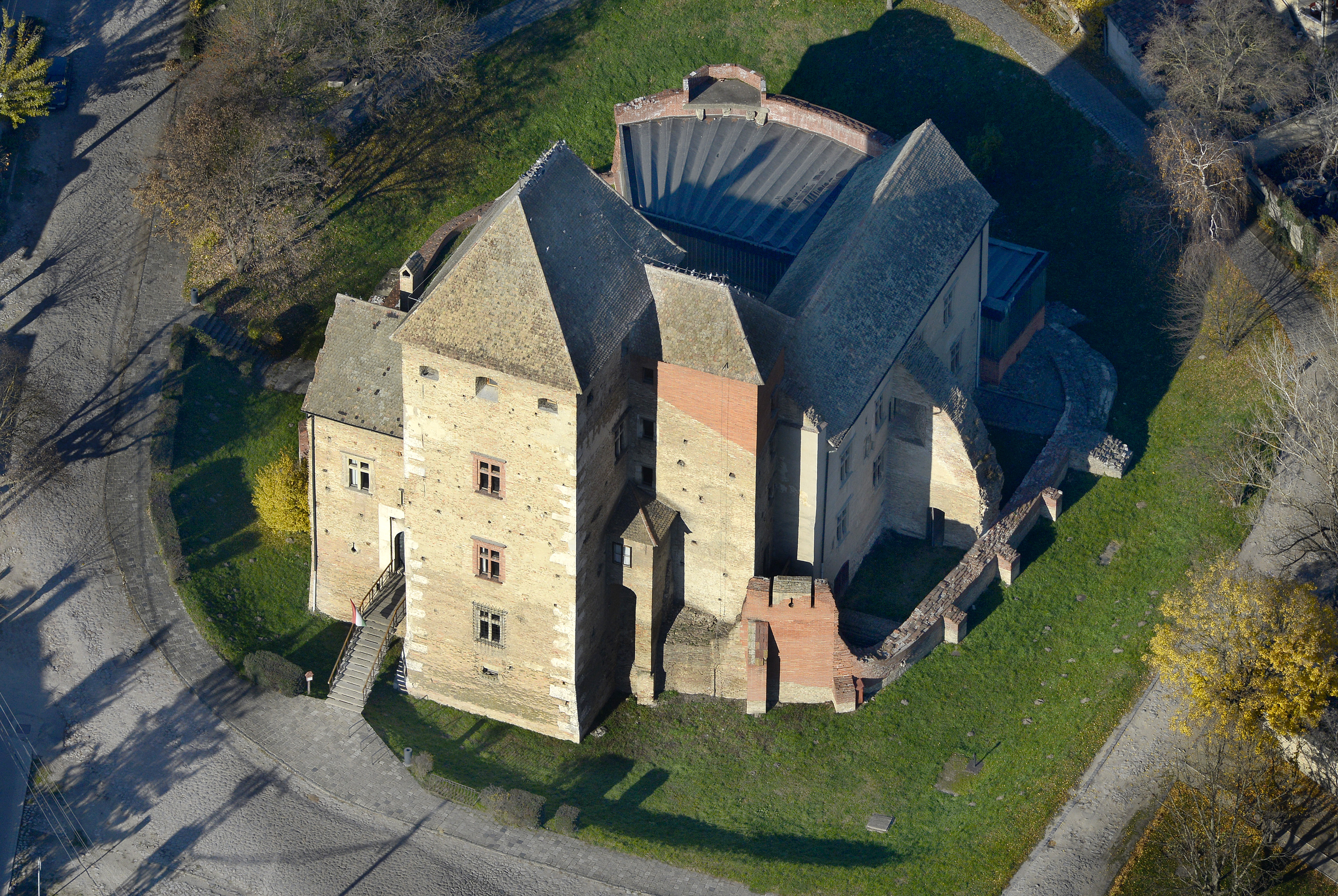 A simontornyai vár légifelvételen